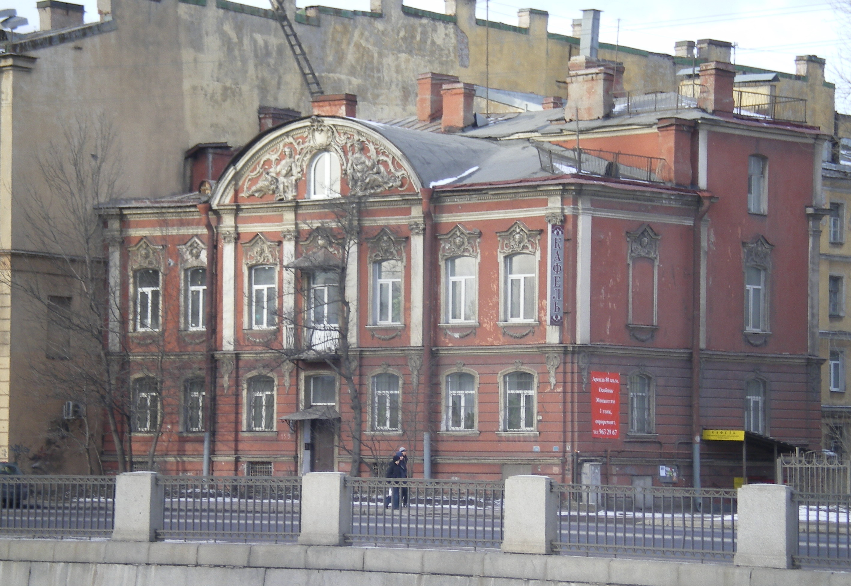 Обводный, 155